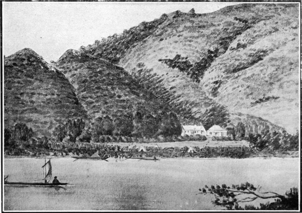 La misión del Reverendo B. Y. Ashwell en el Río Waikato El sitio de esta misión antes de la guerra estaba en la orilla izquierda del Waikato, frente a Taupiri. Esta imagen es un dibujo realizado poco antes de la guerra en 1863, por el Teniente (después Coronel) H. S. Bates del 65 º regimiento, que era Ayudante de Cámara de Sir George Grey y el intérprete personal del General Cameron . El campamento del Gobernador Grey, en una de sus expediciones en el Waikato, se muestra en la orilla del río.